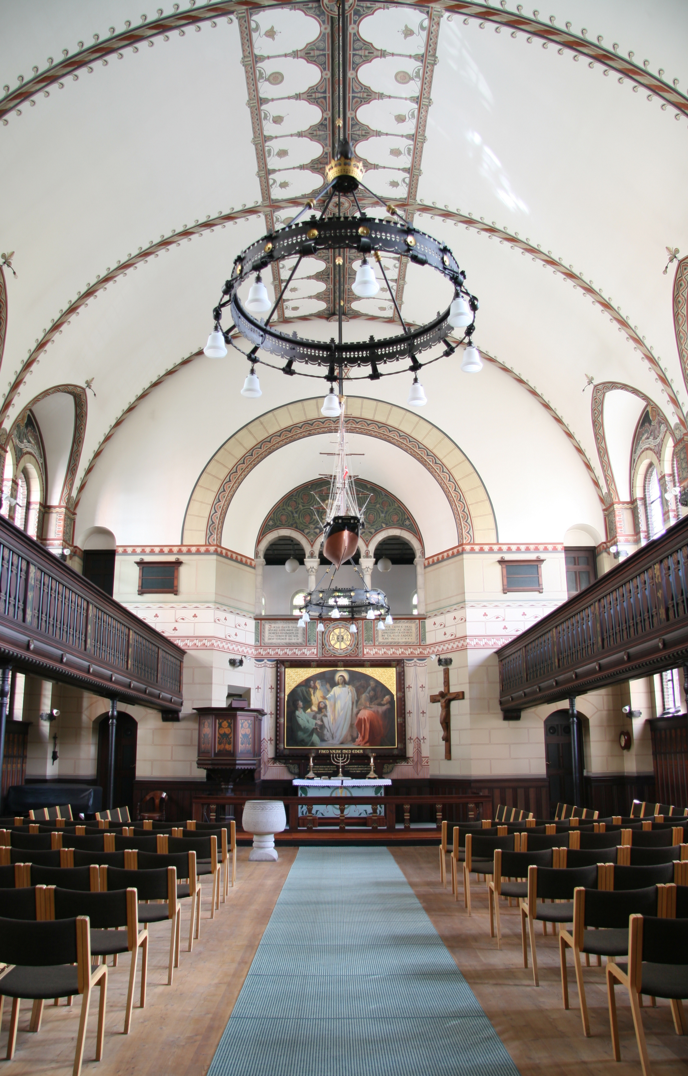 Sankt Lukas Kirke in Copenhagen, Denmark. Interior. Portrait format.